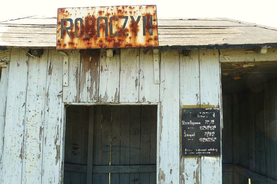 Robaczyn (koło Śmigla) - przystanek kolei wąskotorowej.